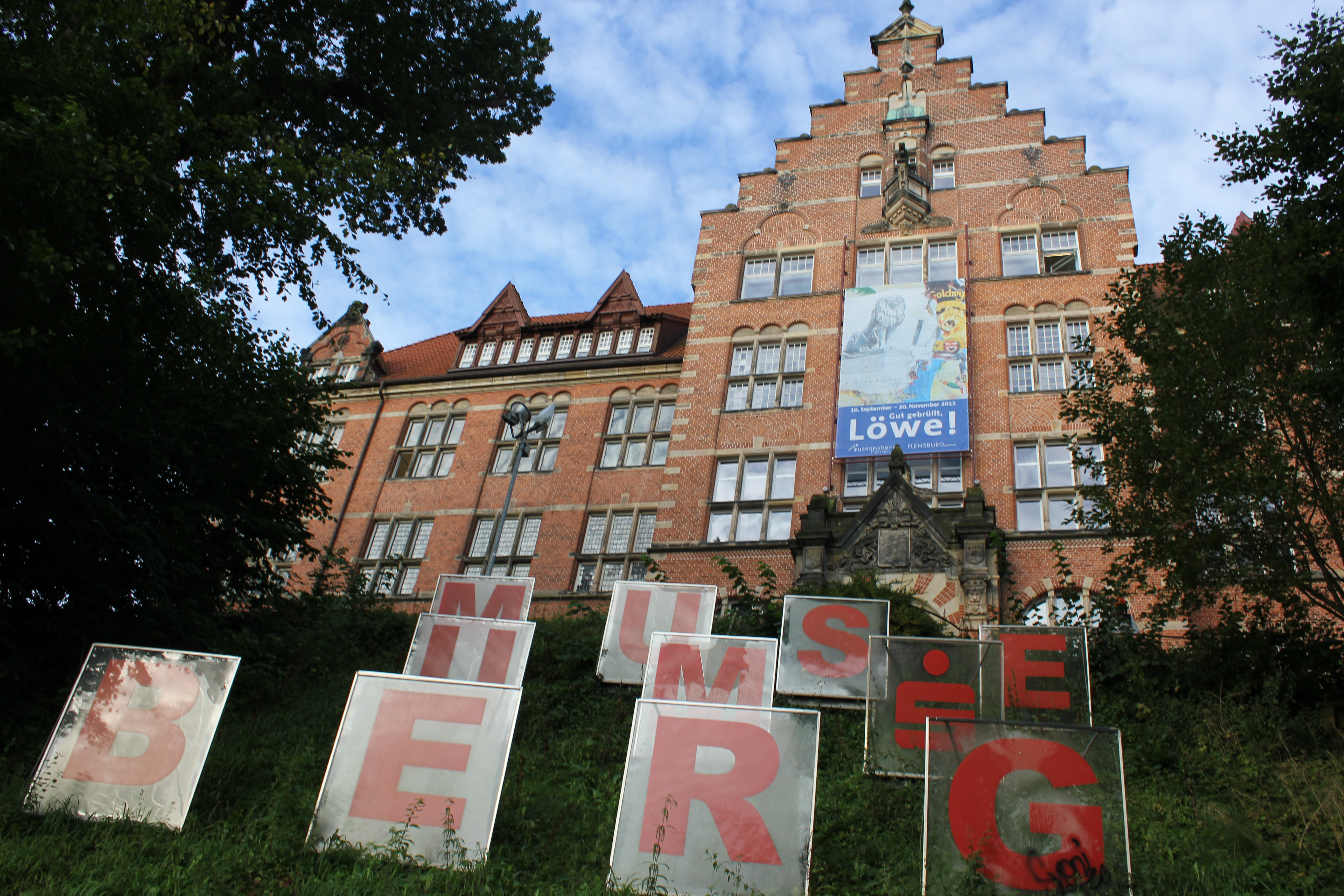 Museumsberg Flensburg